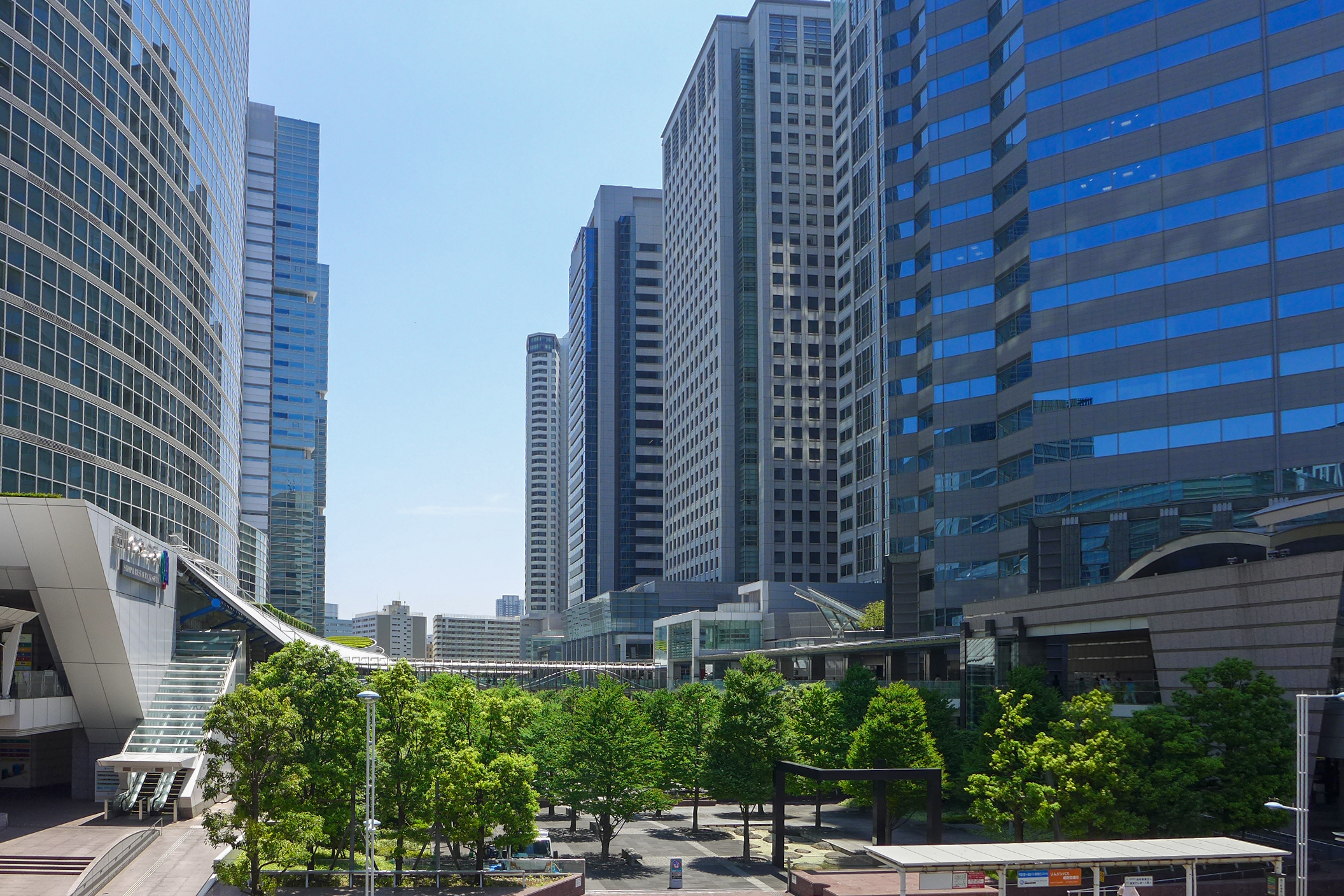 Shinagawa grandcommons